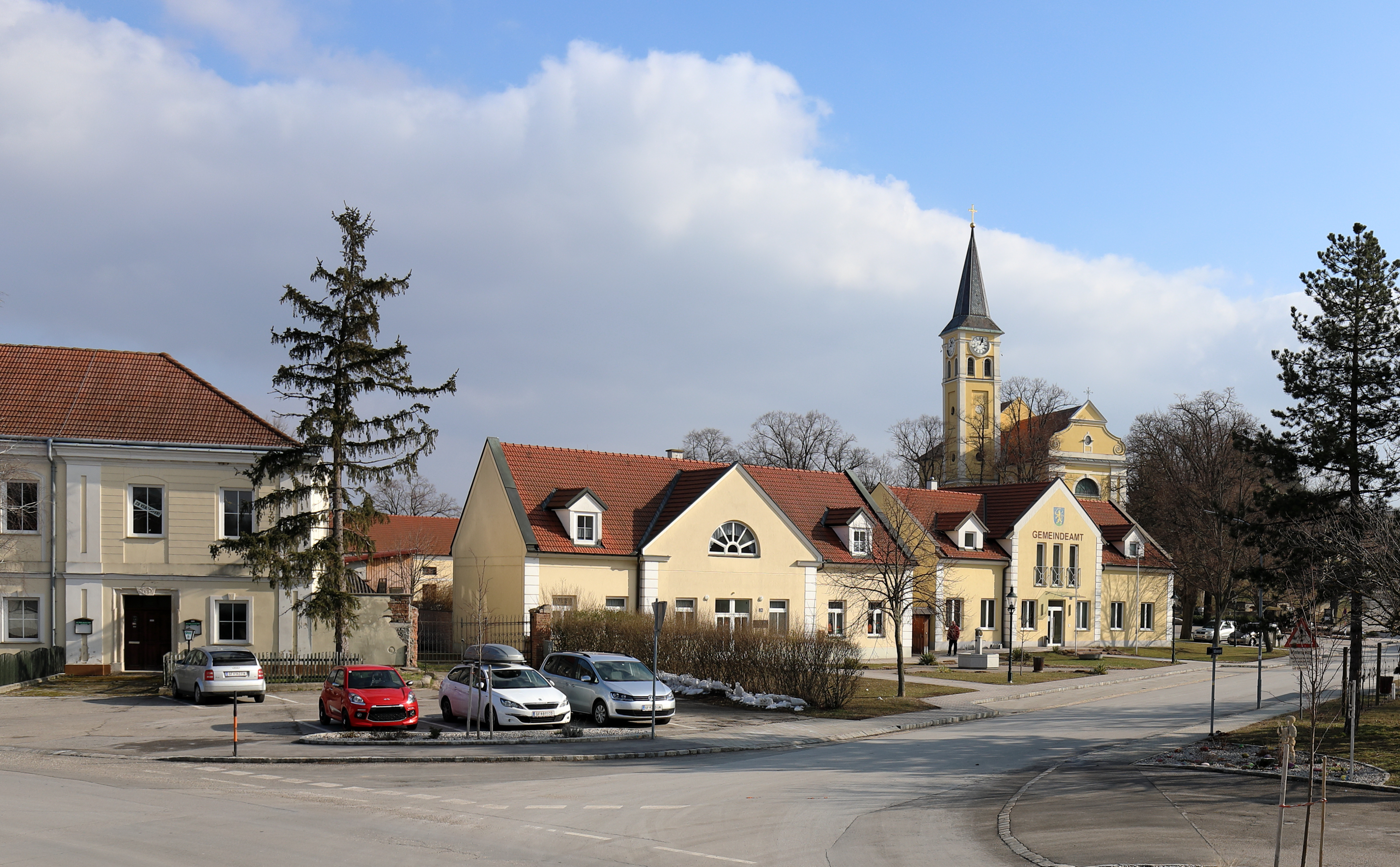 Das Ortszentrum der niederösterreichischen Marktgemeinde Ebenthal mit der erhöht gelegenen röm.-kath. Pfarrkirche hl. Koloman, rechts im Hintergrund.